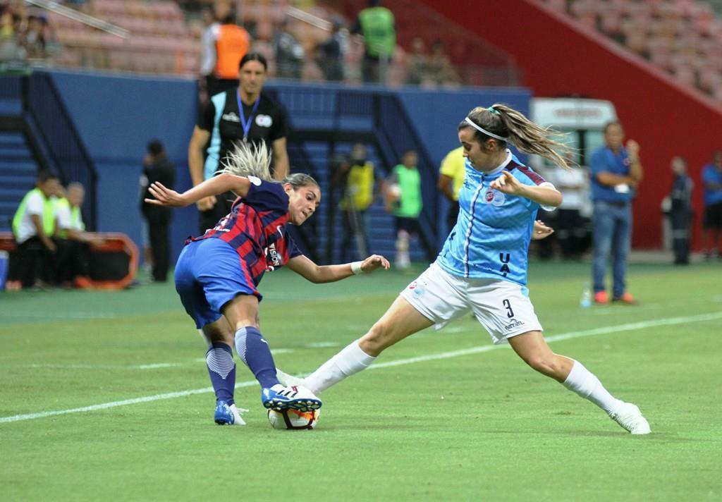 Sofía Schell (5 de marzo de 1994, Entre Ríos, Argentina) es una futbolista argentina que juega como defensora en el club UAI Urquiza. 1​ Debutó profesionalmente en 2016 en el Club Atlético Unión de Santa Fe. 2​ En 2018, ganó el Torneo de Primera División de AFA en las temporadas 2017/2018, 2016 y 2014/2015 junto con UAI Urquiza. 3​ En 2010 formó parte de la Selección de Fútbol Femenino de Argentina sub 17.